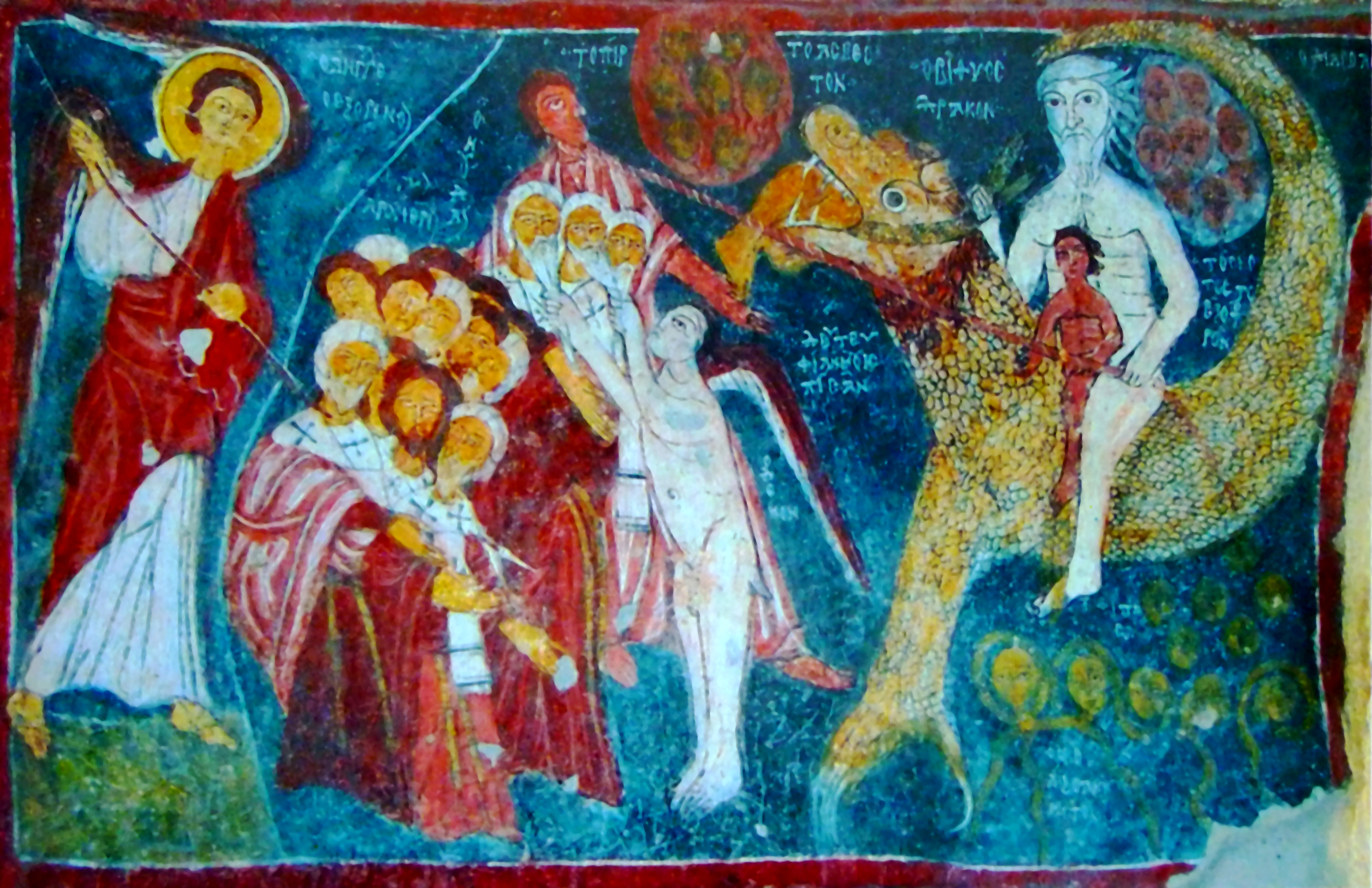 Kappadókia/Göreme Nemzeti Park: Karsi-templom (Karsi Kilise)